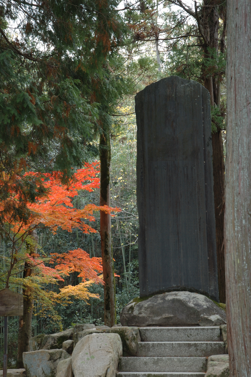 Sesshu stone monument in Hofukuji